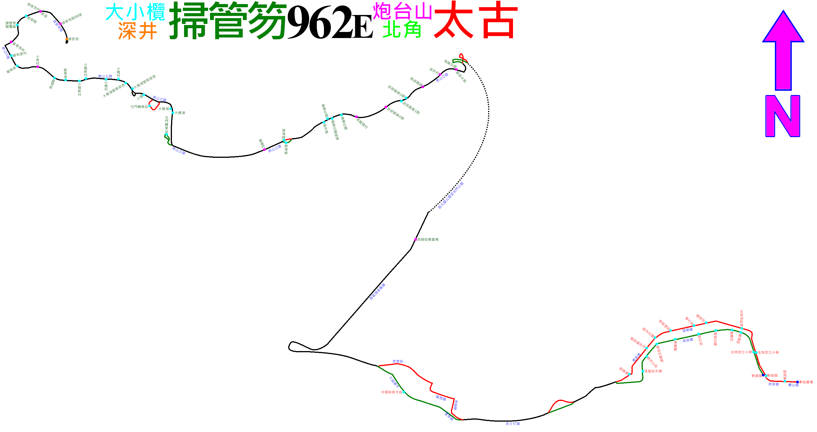 過海隧巴962E線的走線圖